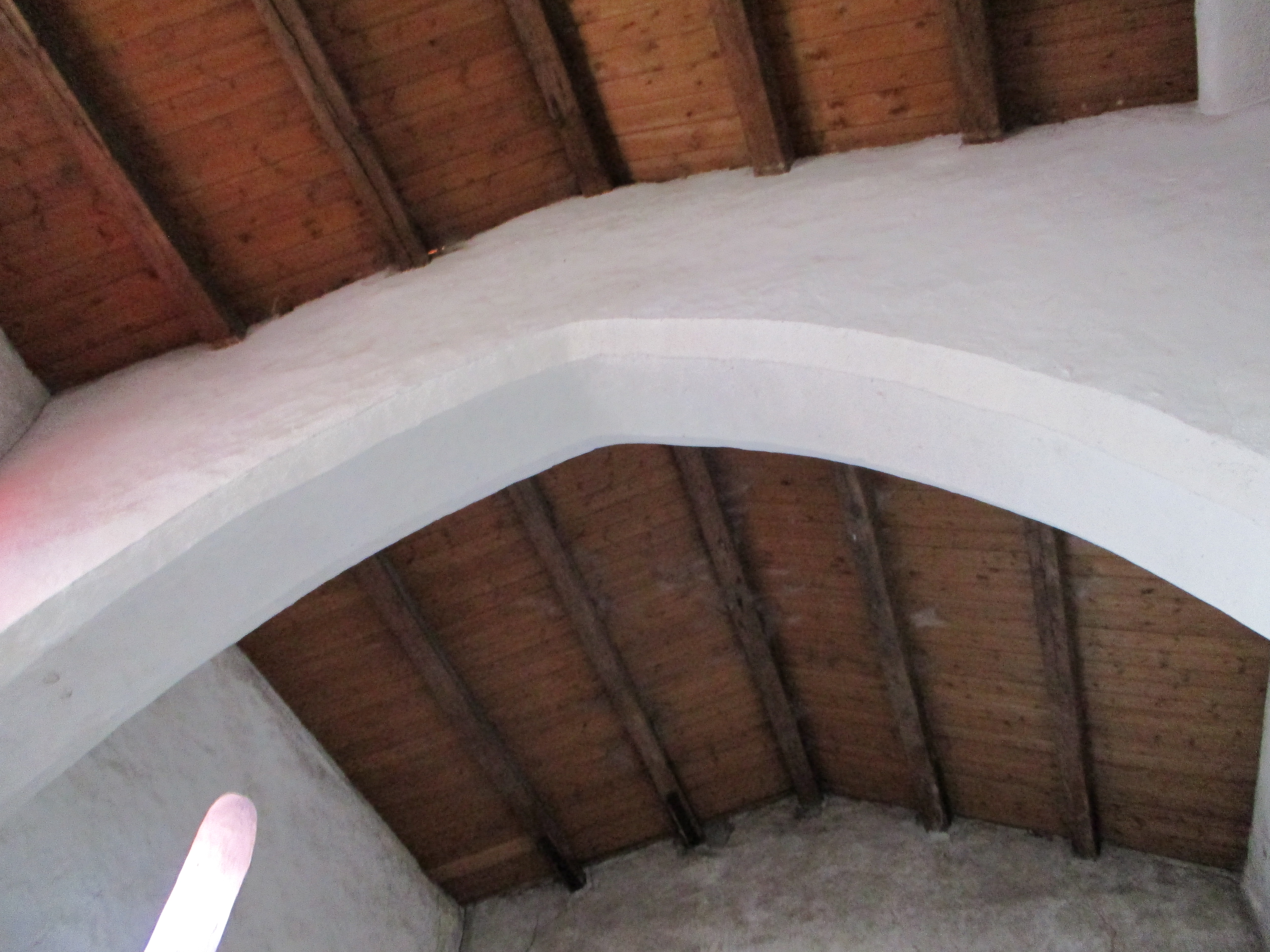 Photographie de l'intérieur de l'église Saint Vincent de St Vincent sur Jard en Vendée, montrant l'arc-diaphragme recoupant la nef, et la charpente apparente en bois.